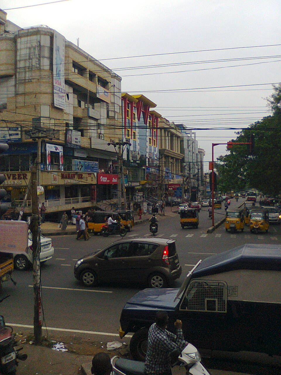 ద్వారకా నగర్